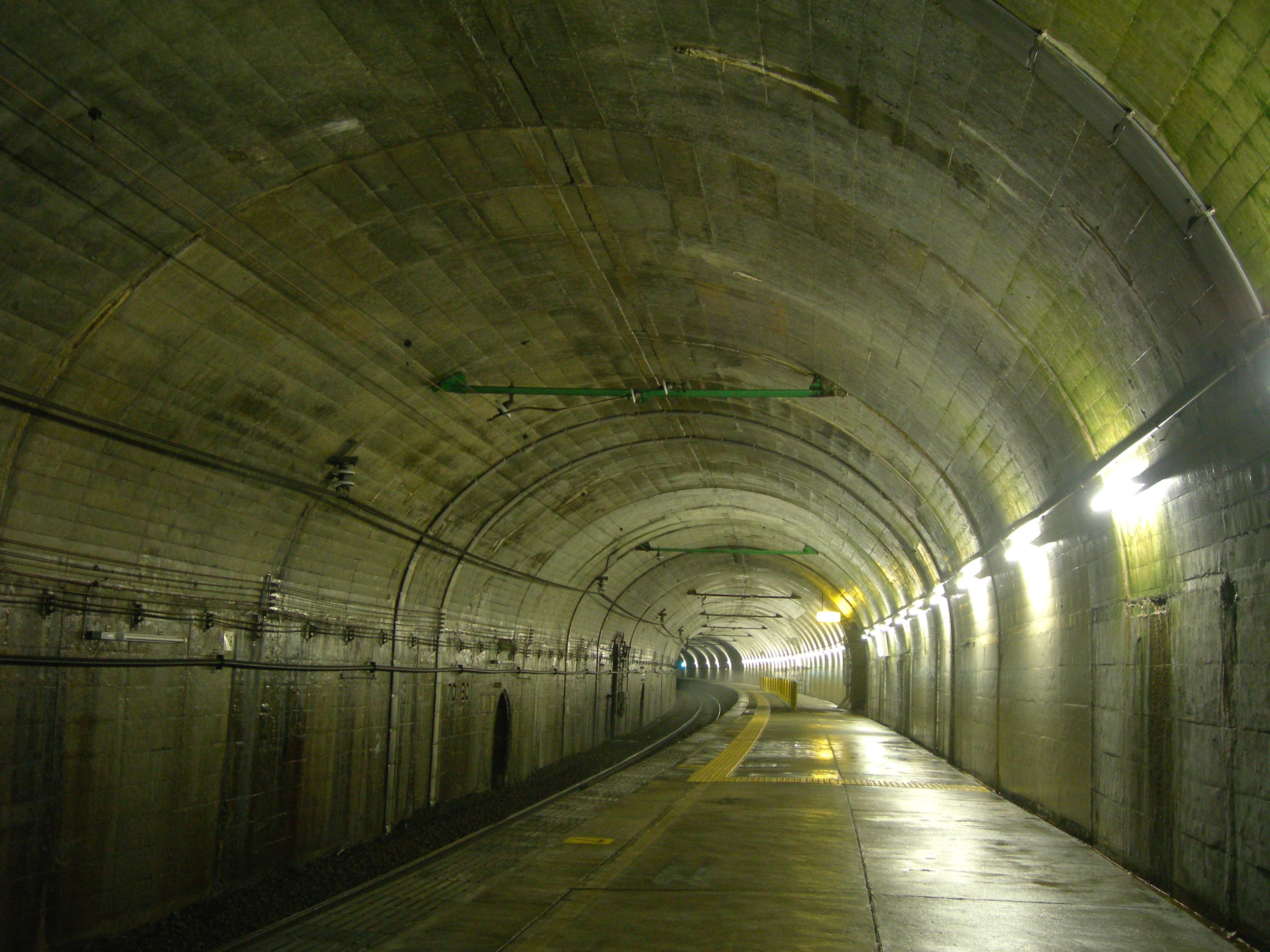 湯檜曽駅（下り・地下ホーム）長岡方面